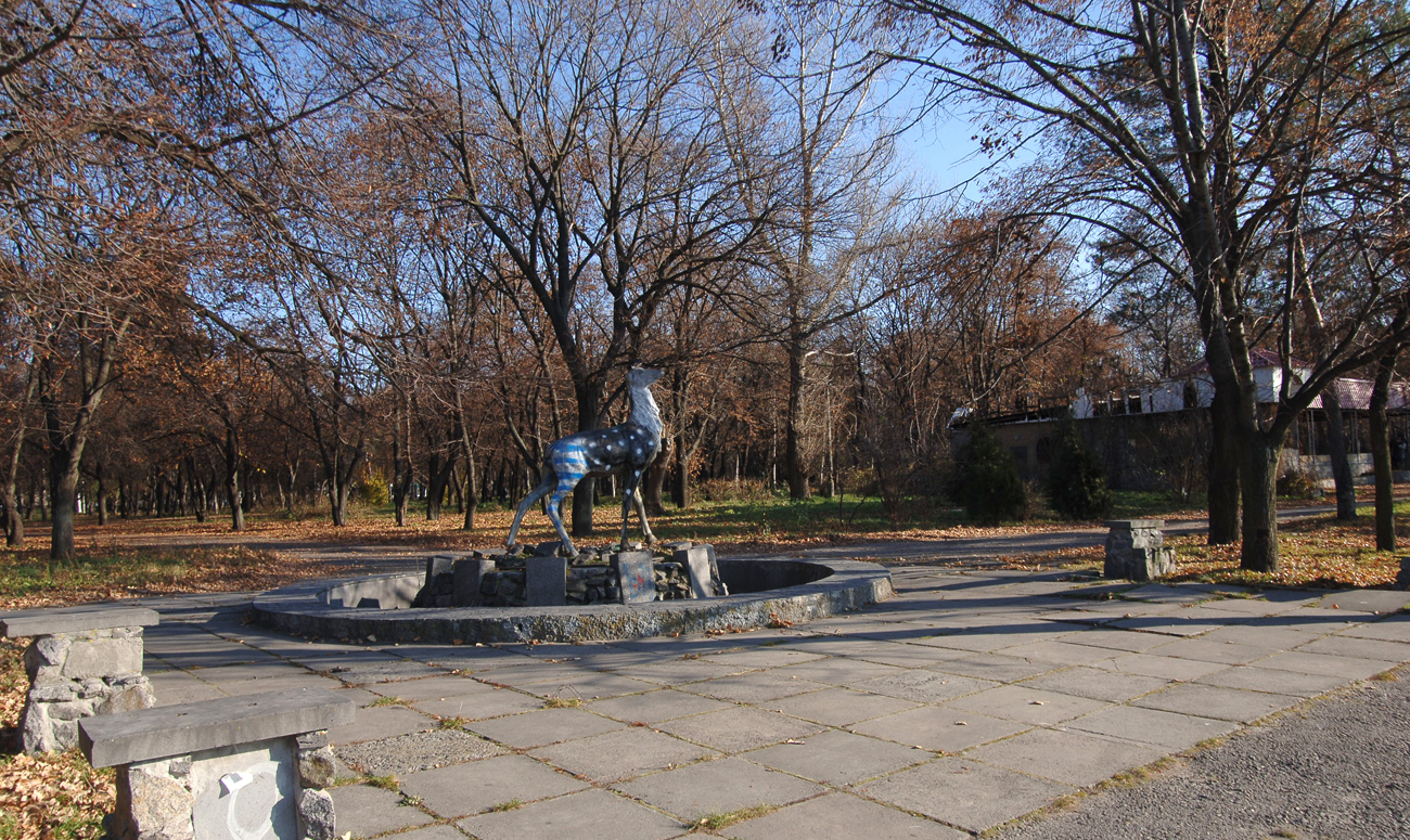 Олень